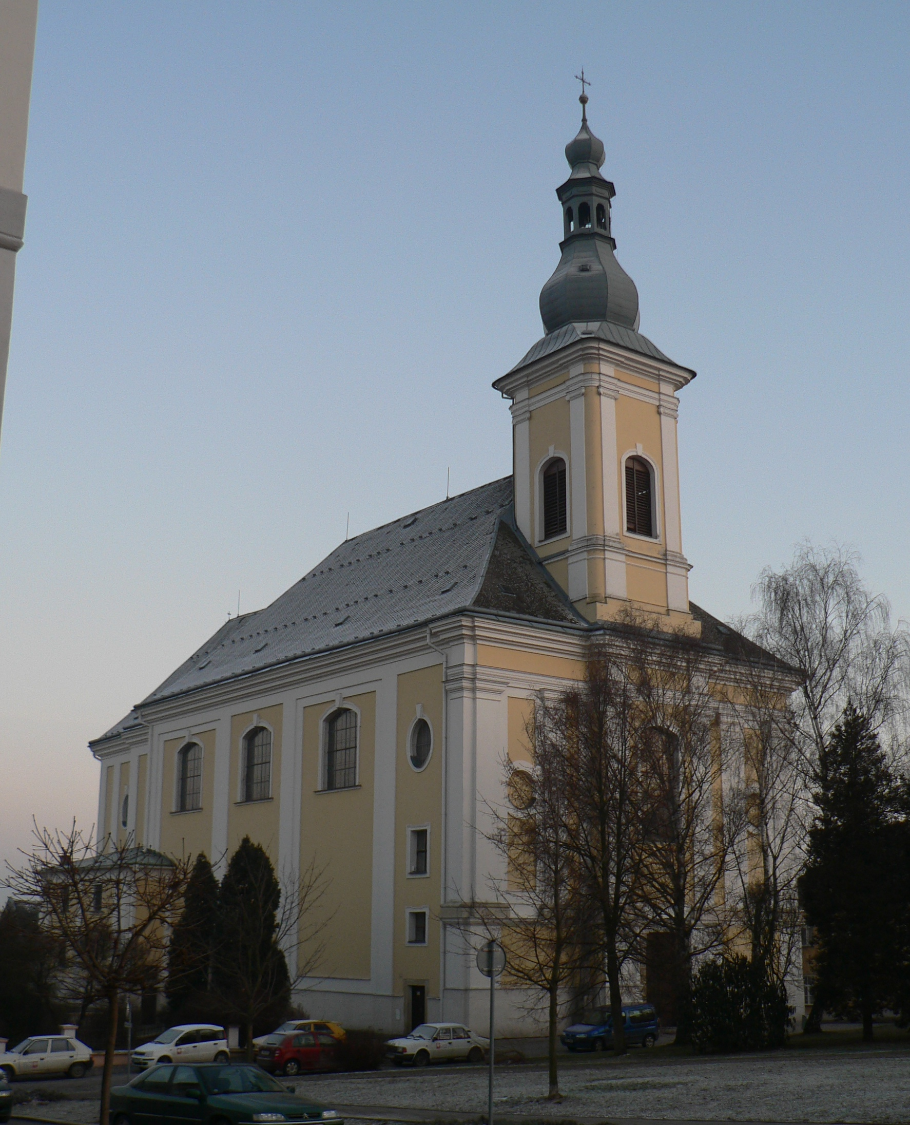 Kostel svatého Bartoloměje (Zábřeh)